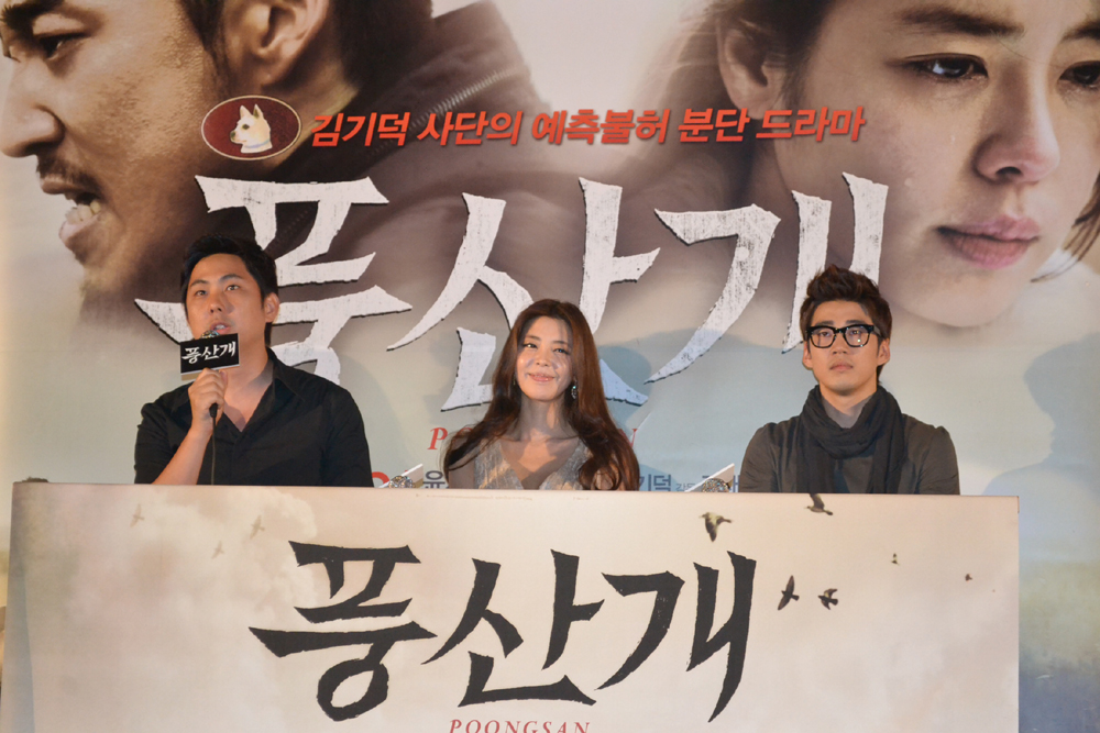 영화 풍산개